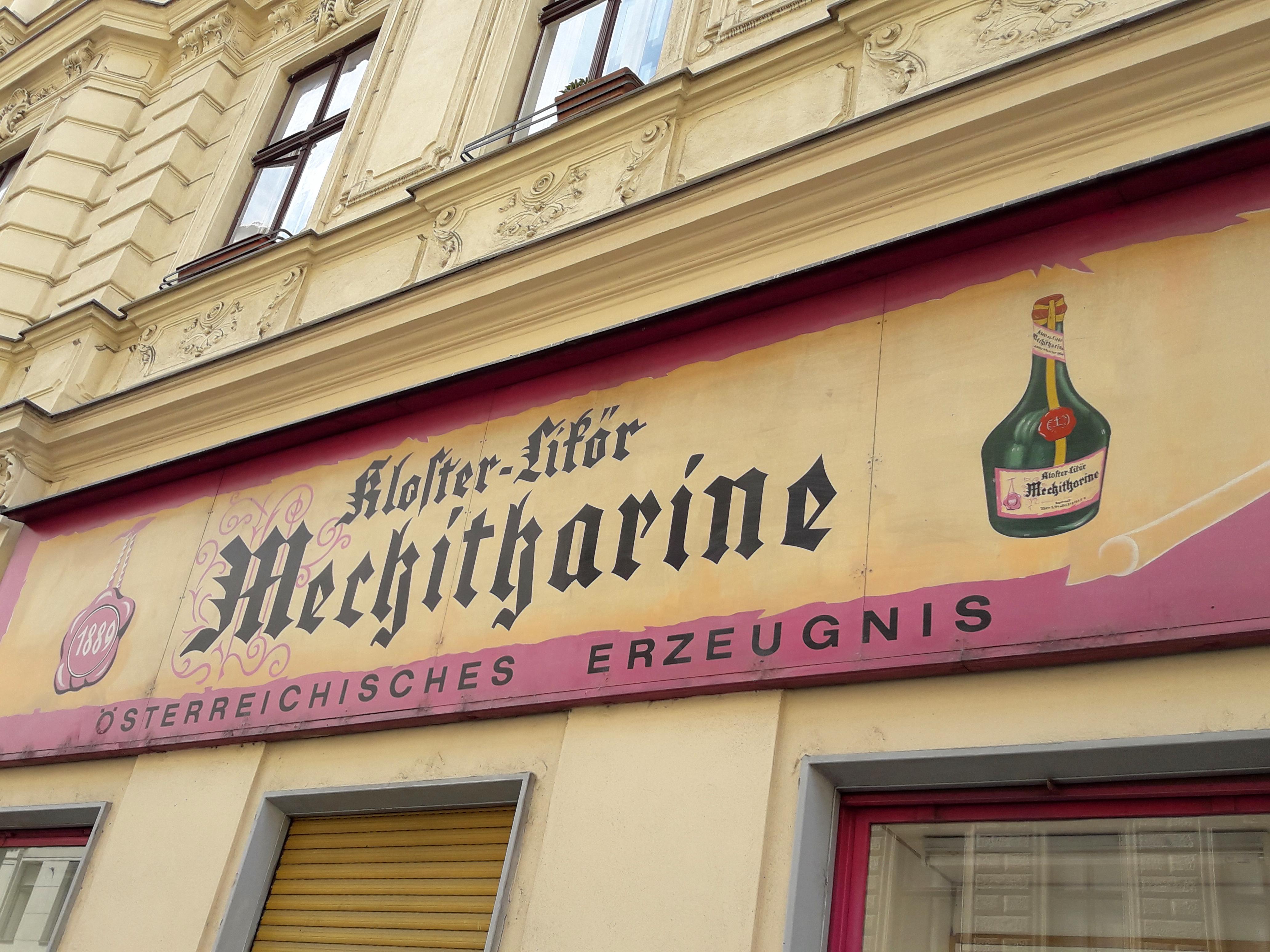 Մխիթարինի խանութը Վիեննայում